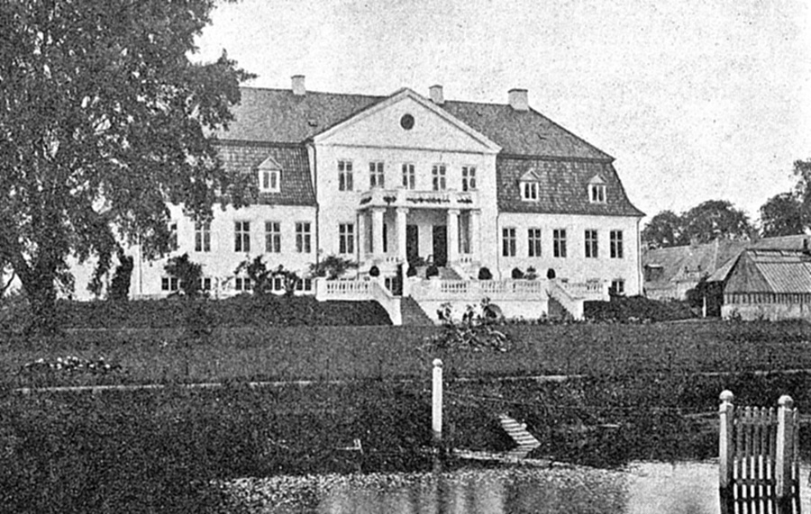 Lundsgård er en gammel hovedgård, som nævnes i 1435. Gården ligger i Revninge Sogn, Bjerge Herred, Kerteminde Kommune. Hovedbygningen er opført i 1765 ved G. D. Tschierscke.